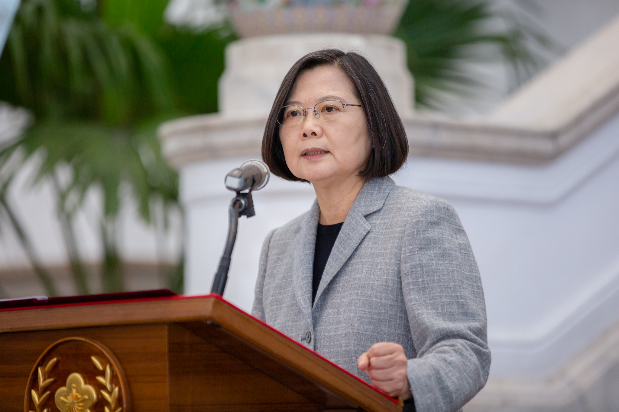 04.01 針對武漢肺炎防疫和因應發表談話，並接受媒體相關時事提問